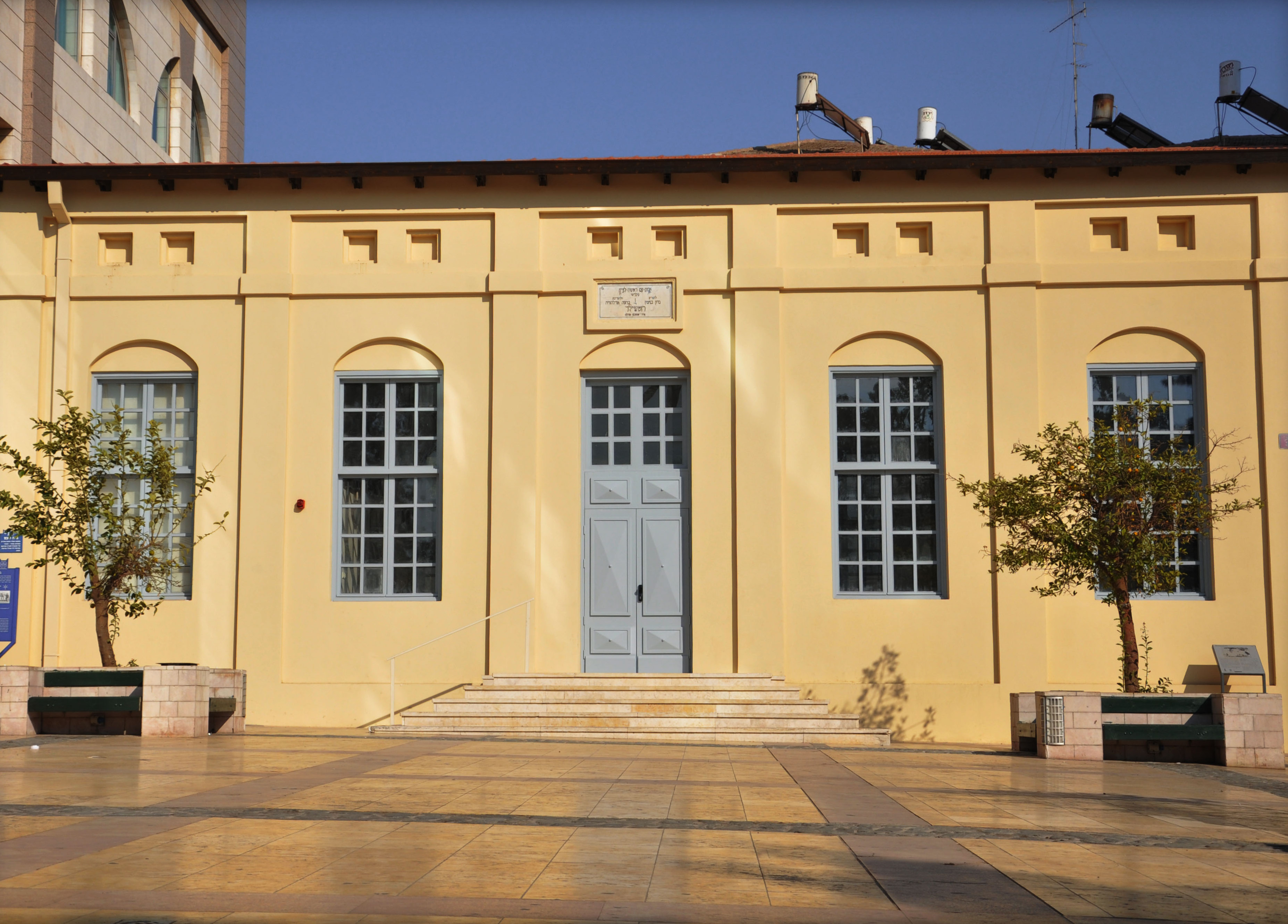 נמצא ממזרח לגן המושבה, זהו בית העם העברי הראשון בארץ, שם התקיימו פגישות מועצת האיכרים של ראשון, הוקמה בו ספרייה ושם ניגנה האורקסטרה של ראשון - התזמורת העברית הראשונה בארץ-ישראל.